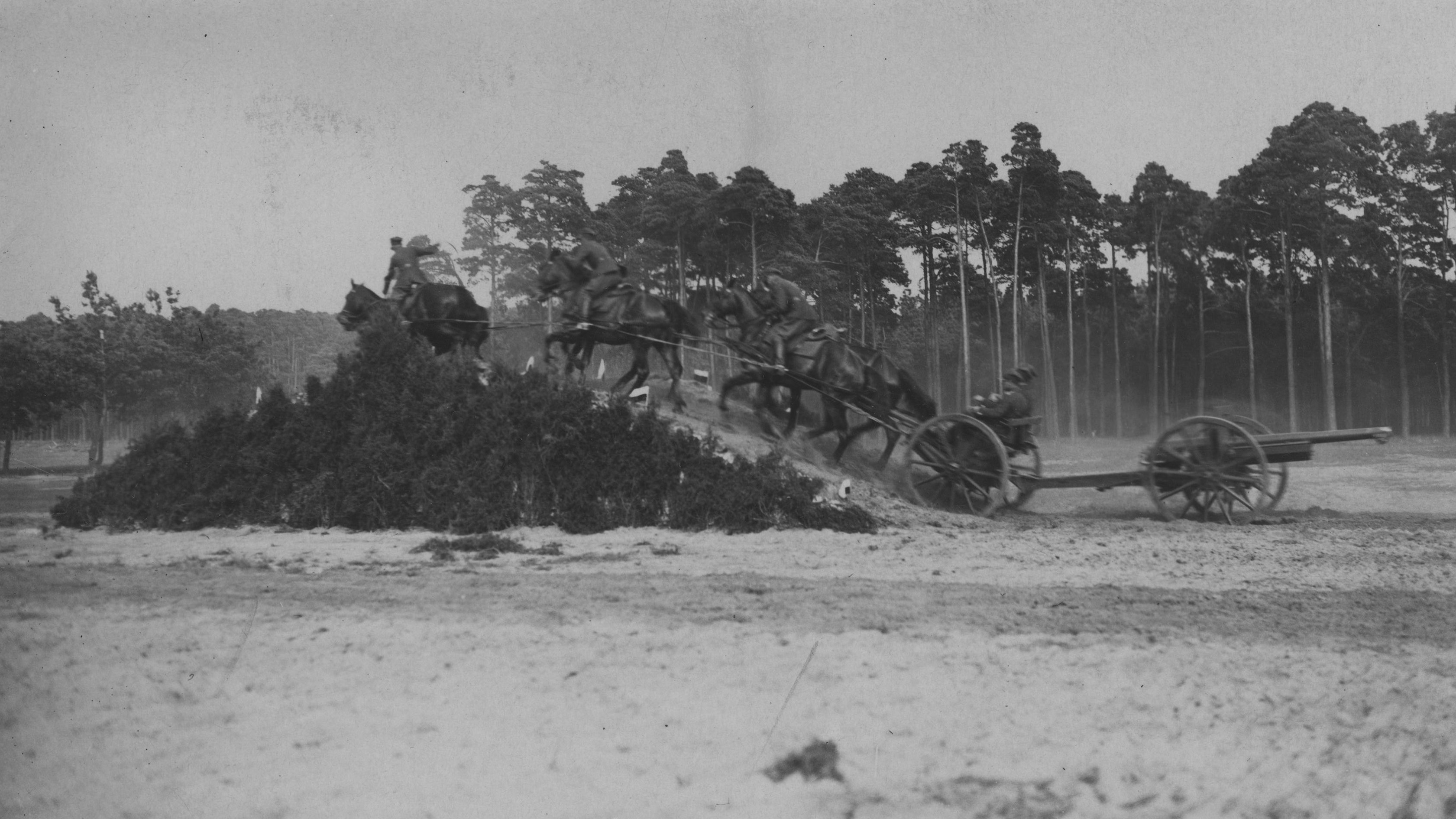 Szkolenie w Szkole Podchorążych dla Podoficerów w Bydgoszczy. Zaprzęg artyleryjski z armatą polową 75 mm Schneider wz. 1897 pokonuje wzniesienie. Koncern Ilustrowany Kurier Codzienny - Archiwum Ilustracji. Sygnatura: 1-W-850-1